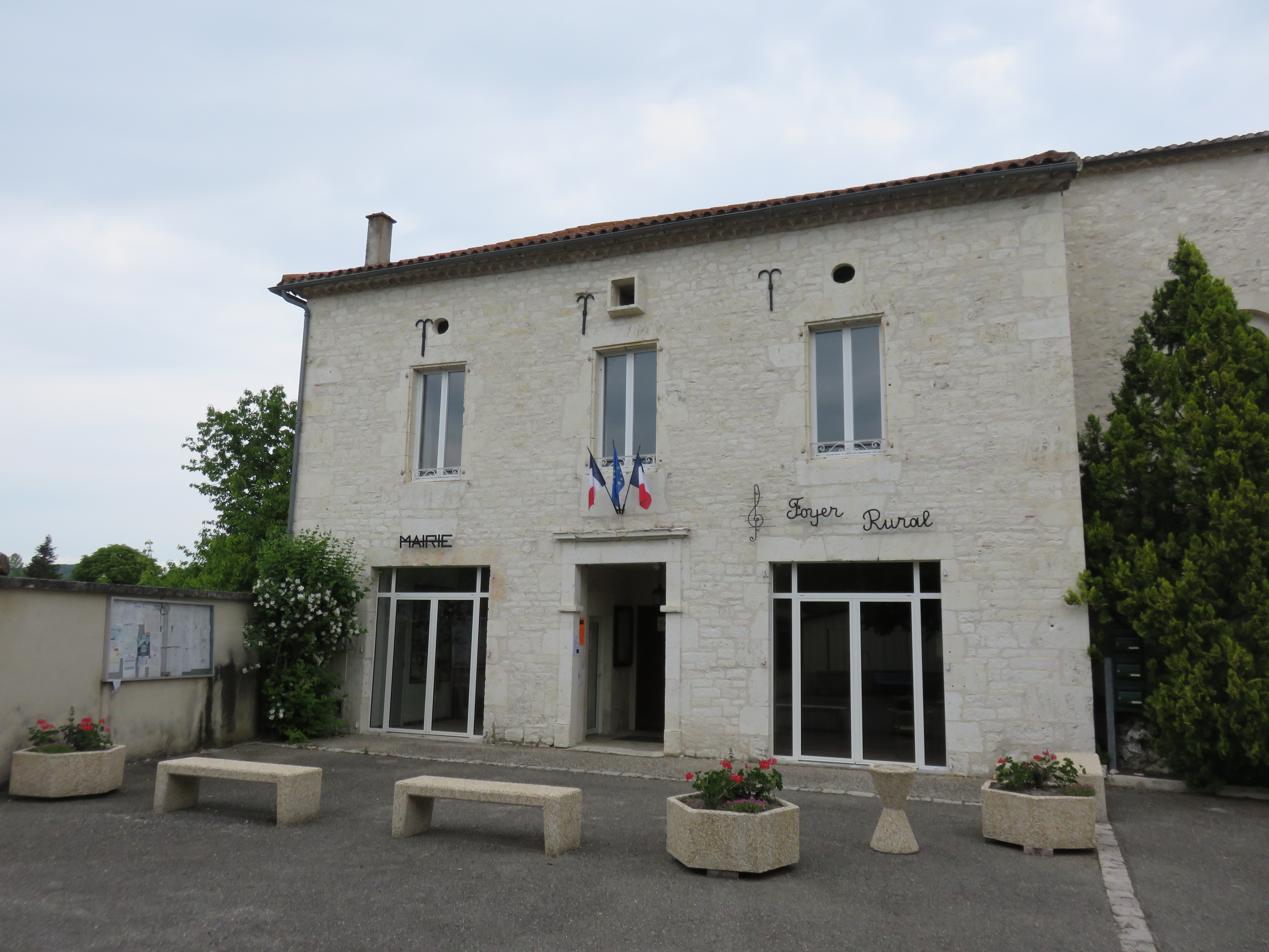 Mairie de Saint-Daunès (Lot, France).